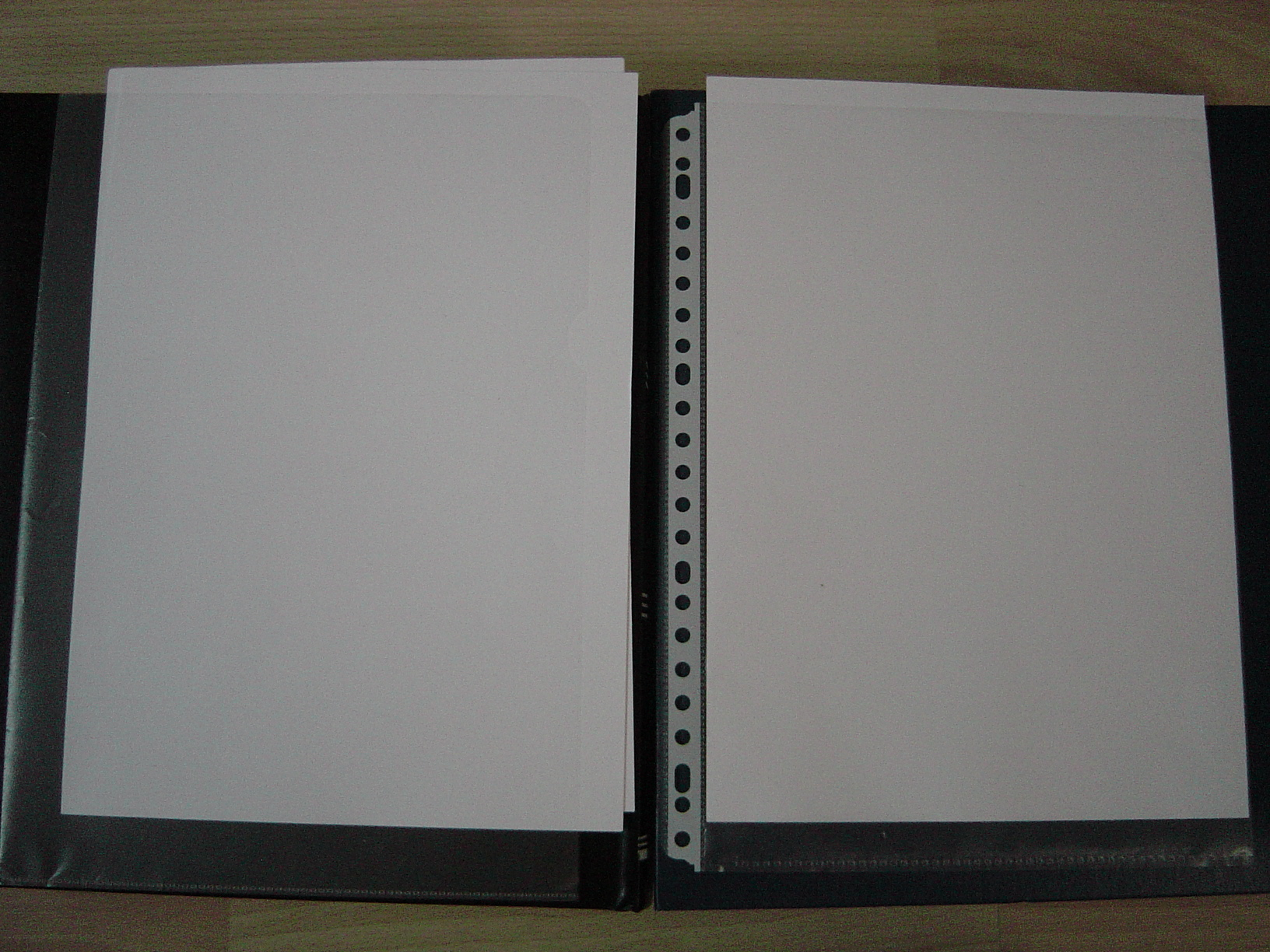 plastic insteekhoezen